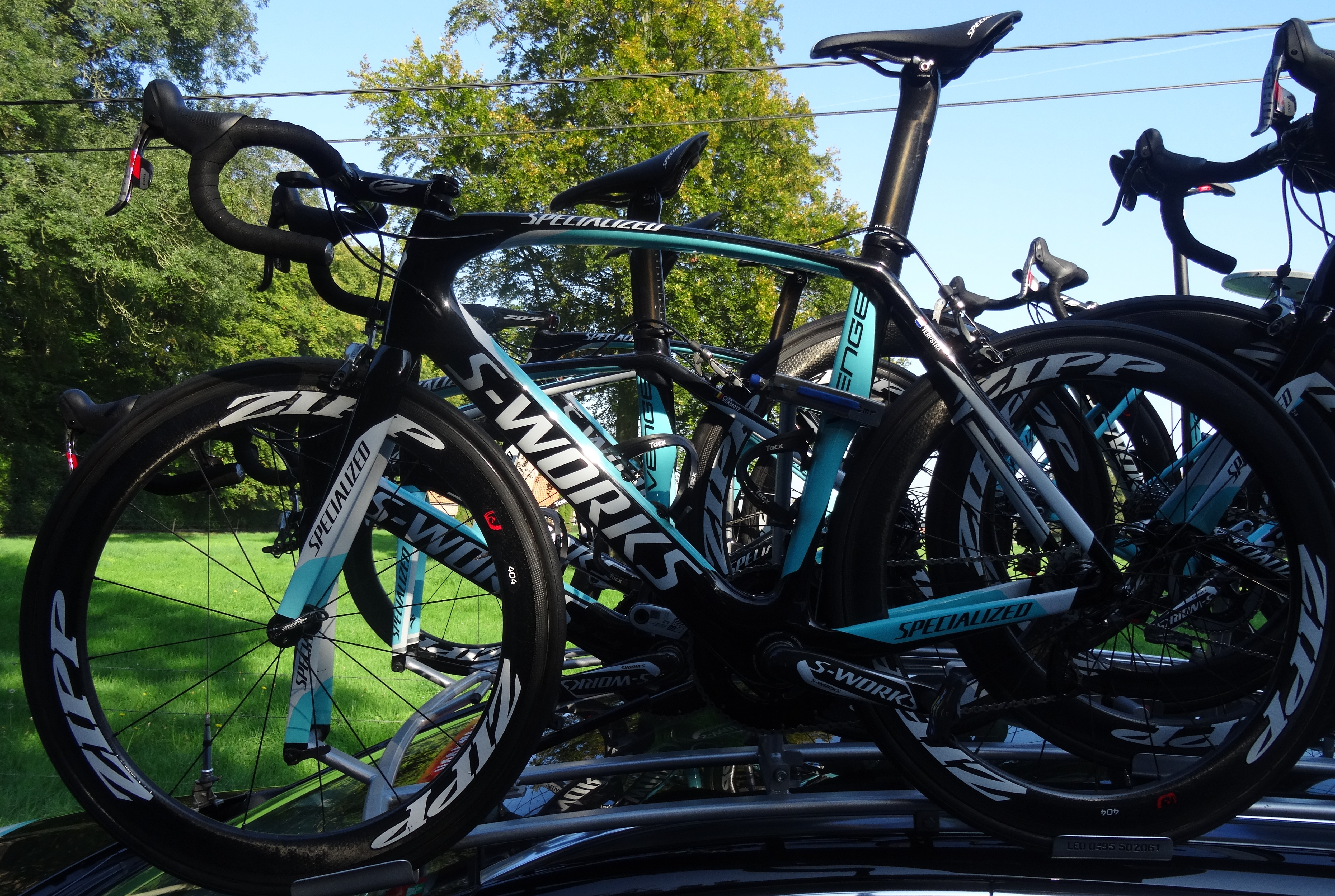 Reportage photographique réalisé le vendredi 3 octobre à l'occasion du départ de la deuxième étape de l'Eurométropole Tour 2014 à Estaimbourg (Estaimpuis), Belgique.